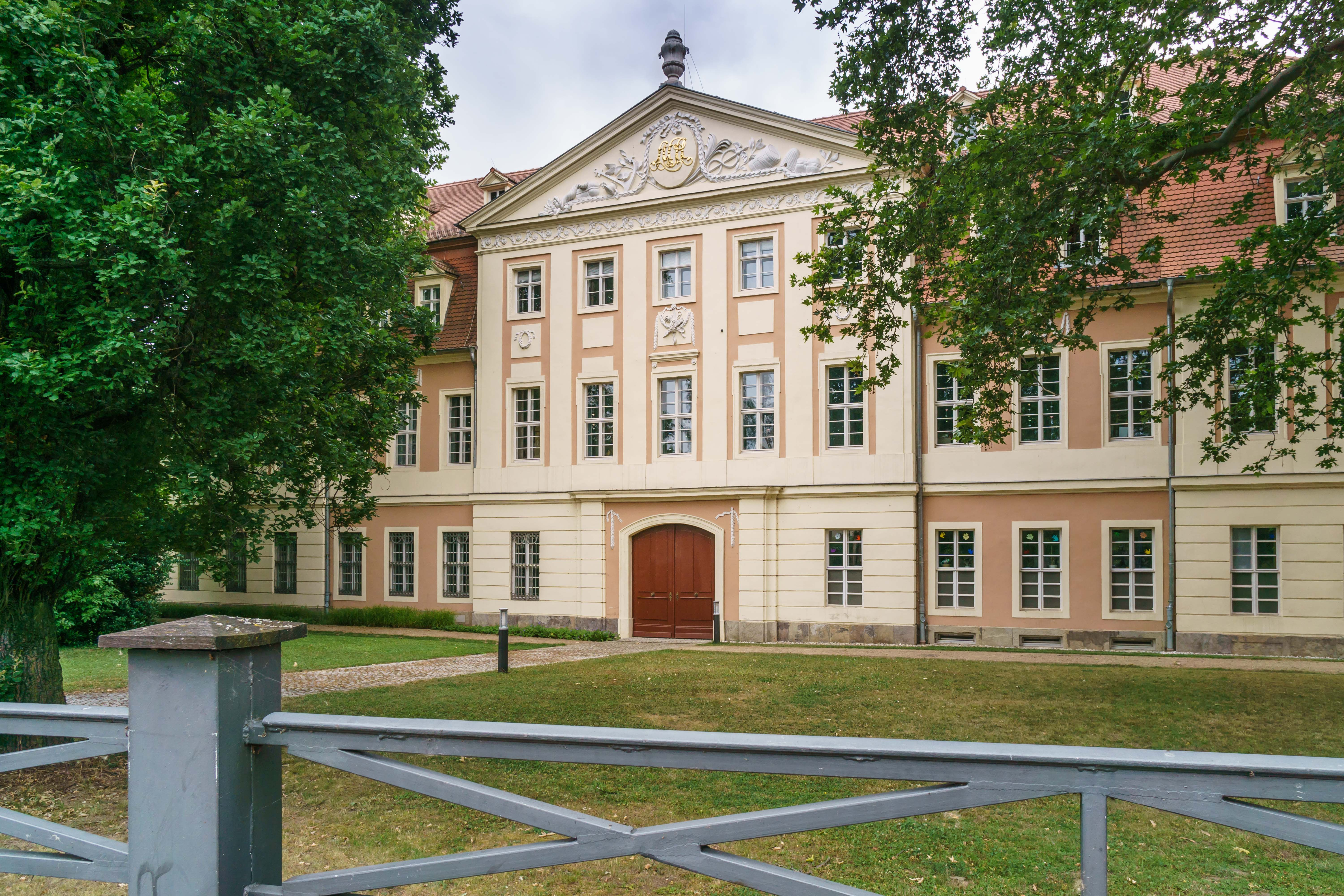 Portal Albrechtsches Palais, Badstubenvorstadt 12, 13 in Zeitz